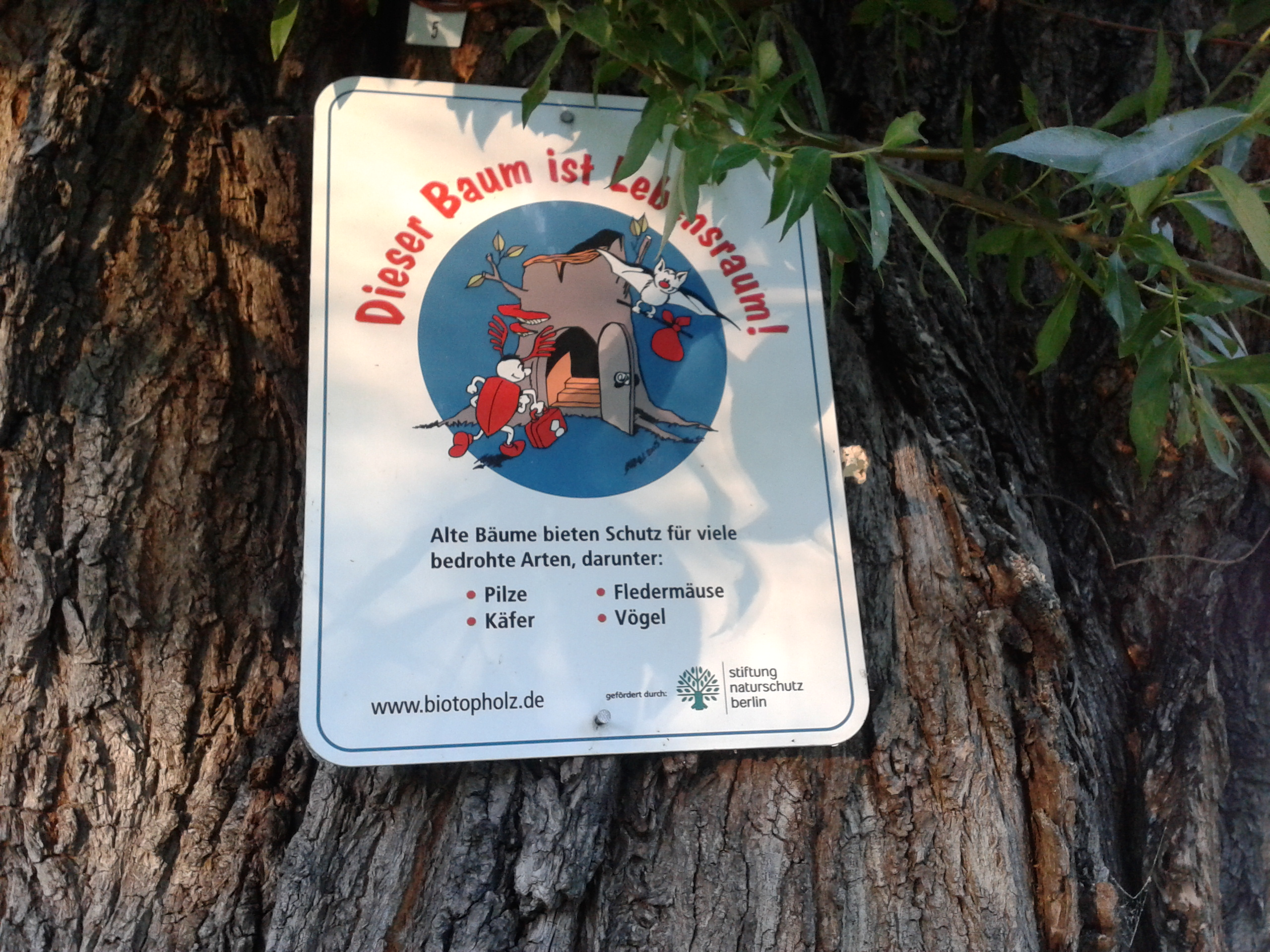 Spaziergang über die Halbinsel Strahlau, eine Berliner Landzunge zwischen der Spree und dem Rummelsburger See gelegen.